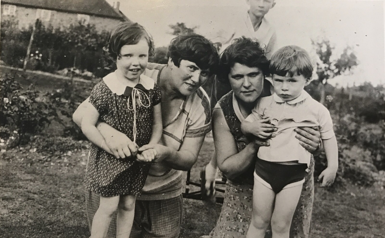 Rose and her son Alyosha, London, Great Britain, 1932